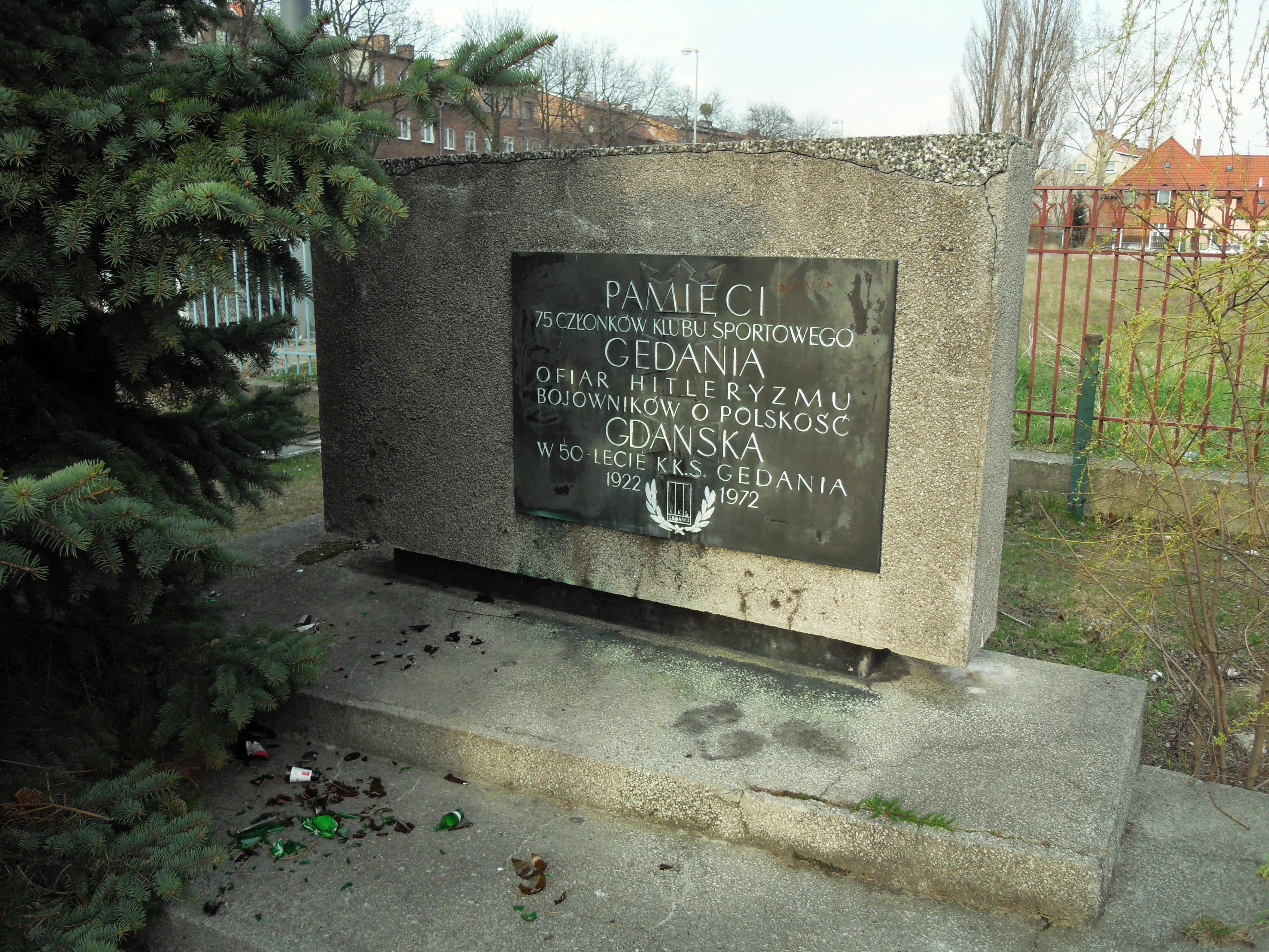 Gdańsk Wrzeszcz. Pomnik przy ul. Kościuszki 49, na terenie Gdańskiego Klubu Sportowego "Gedania".